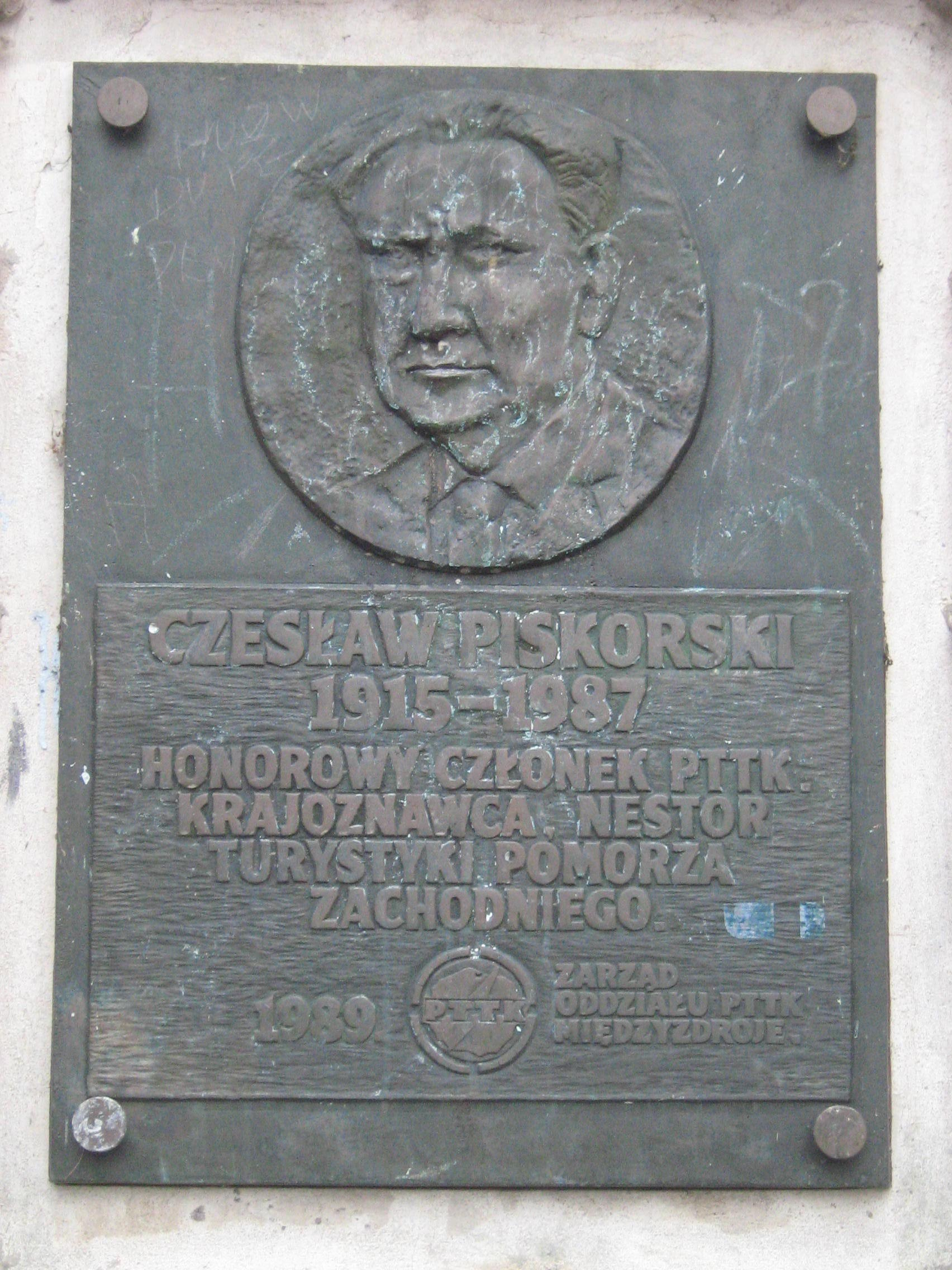 Tablica pamiątkowa poświęcona Czesławowi Piskorskiemu